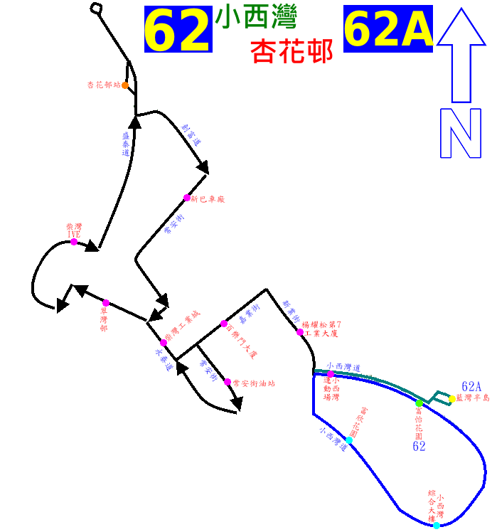 中文（香港）: 港島專線小巴62系列路線的走線圖，當中藍線表示只有62駛經，而藍綠線則表示只有62A駛經